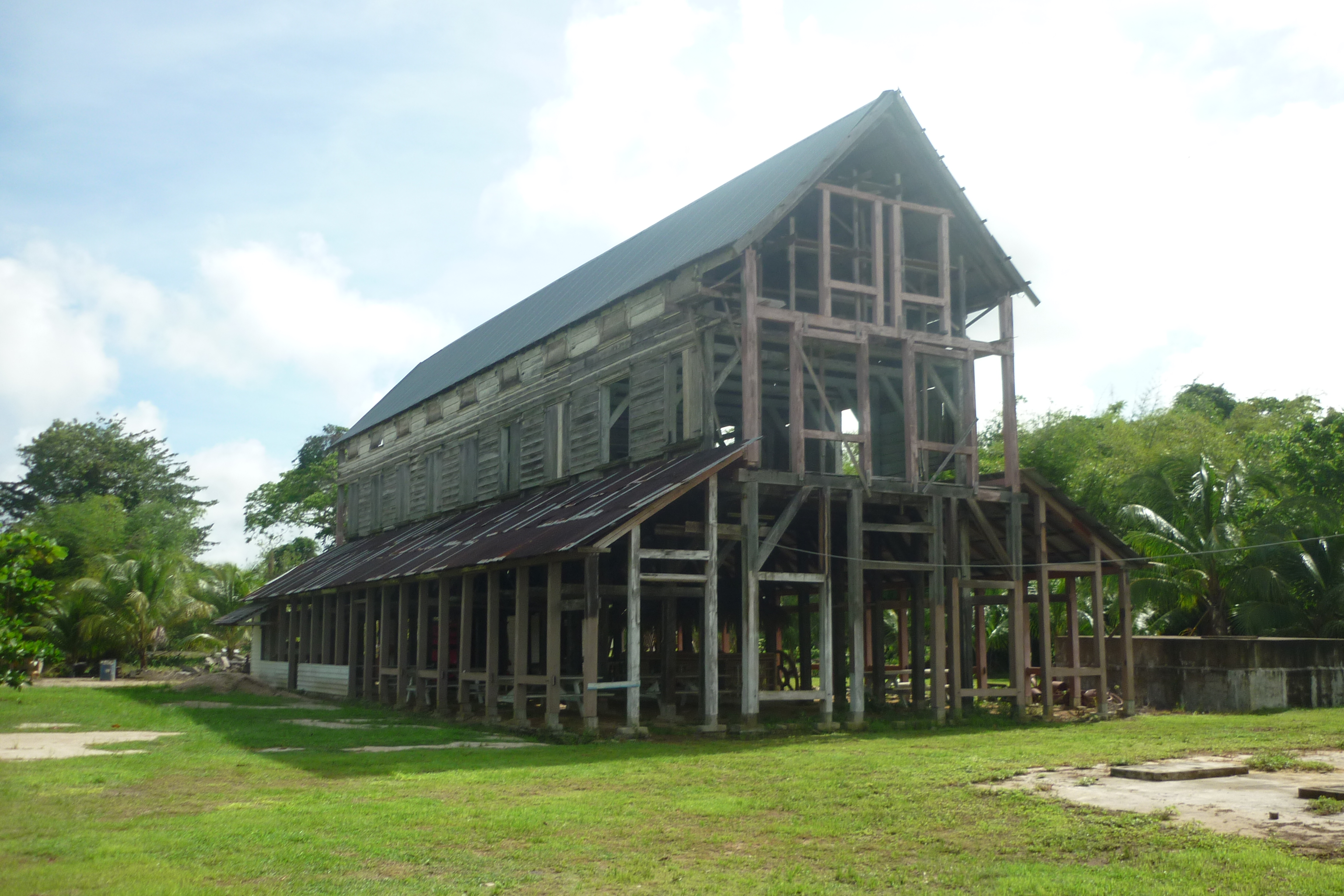 Plantage Peperpot: Schuur om koffie te drogen